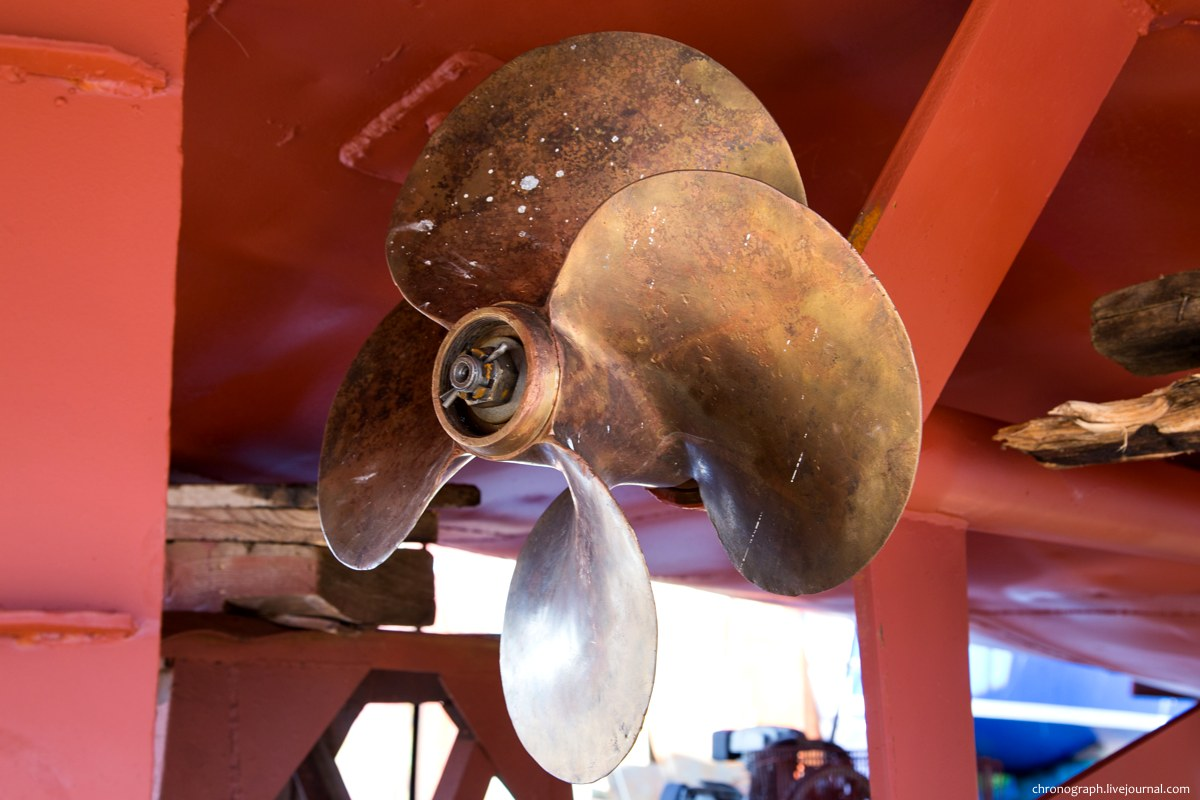 Копия бронекатера БК-73 проекта 1125 времён Великой Отечественной войны. Строительство бронекатера велось на Тольяттинском судоремонтном заводе. Многие использованные детали оригинальные